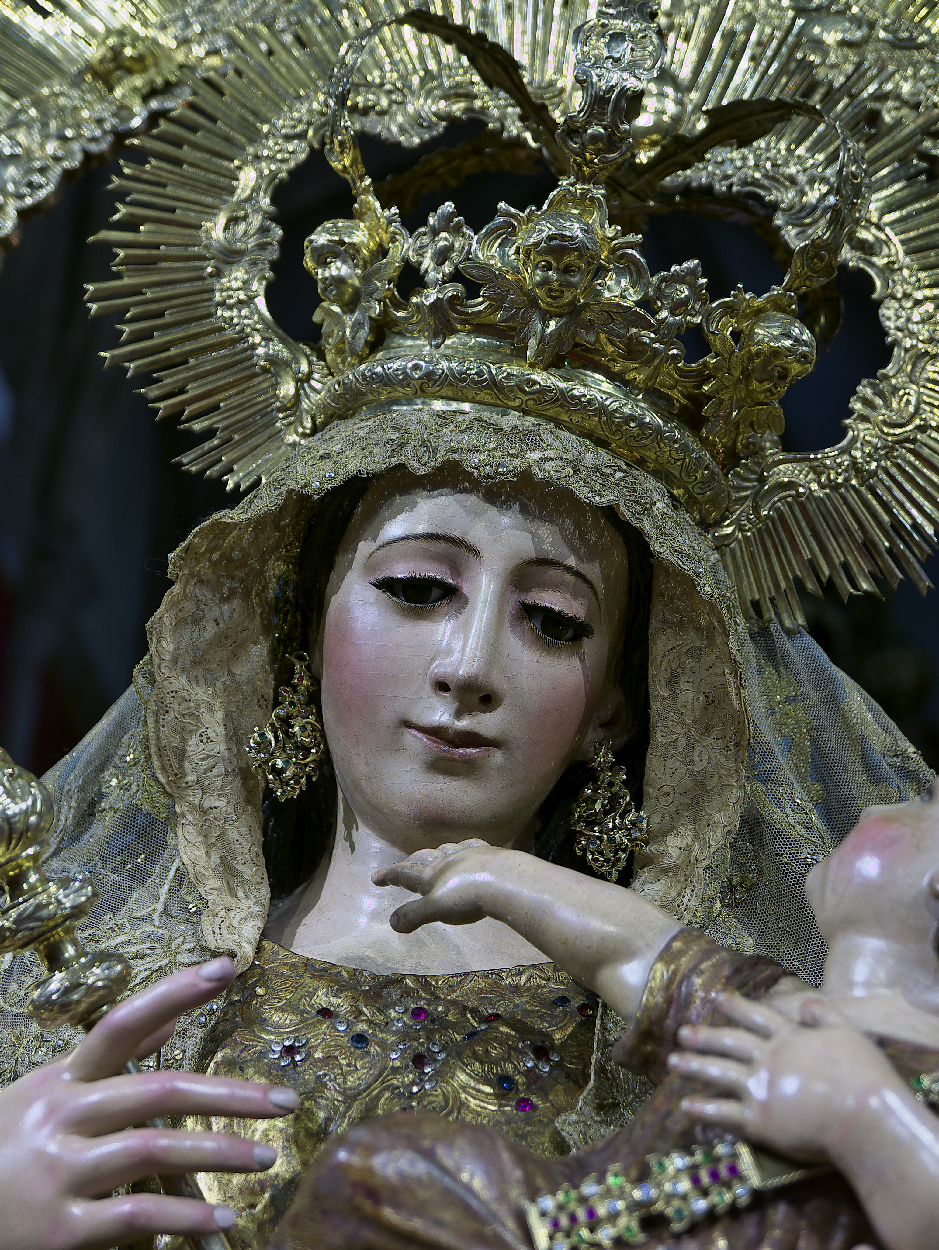 Roque Balduque talla (1554) en madera de cedro policromada la imagen de Nuestra Señora Reina de Todos los Santos, Sevilla.